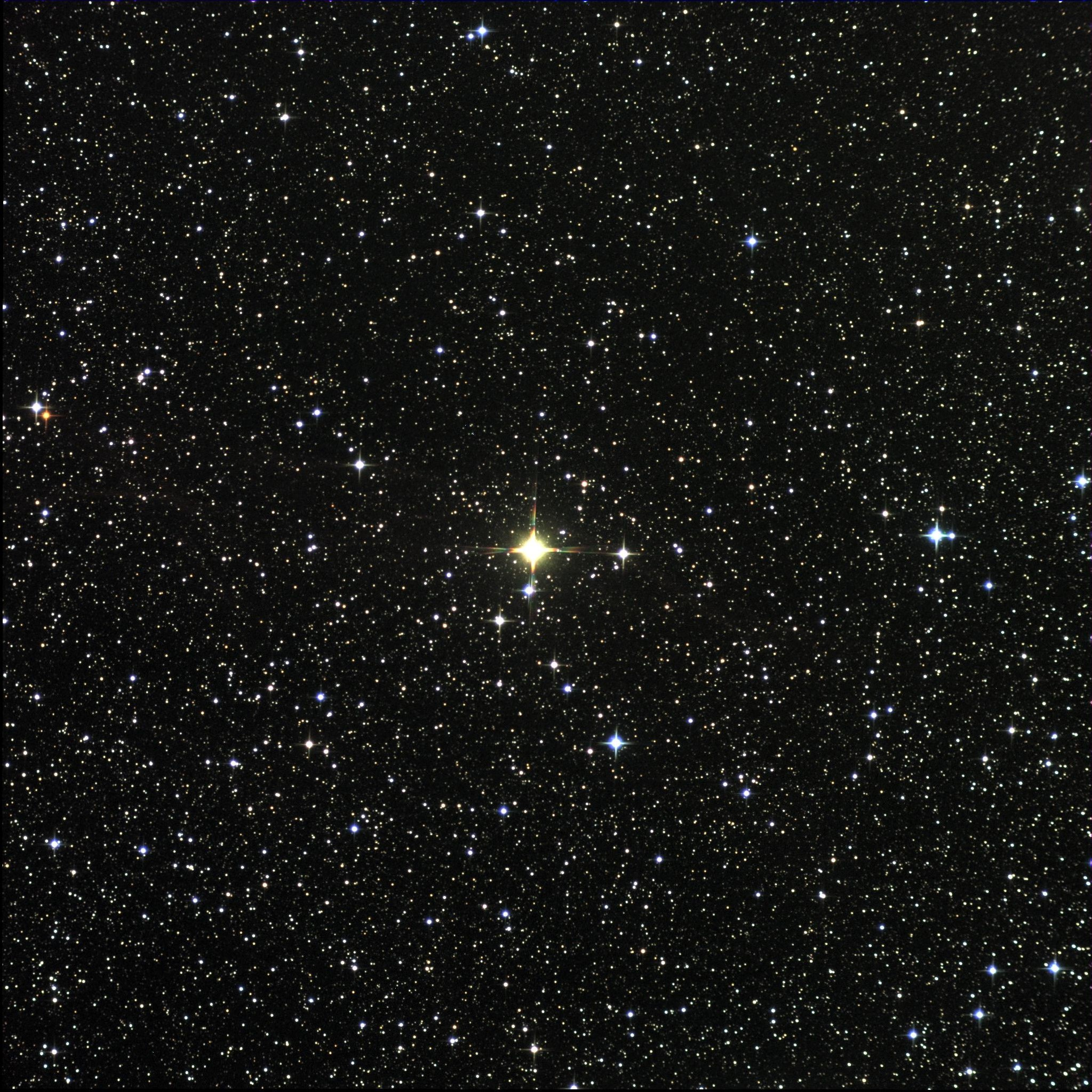 Omicron² du Cygne